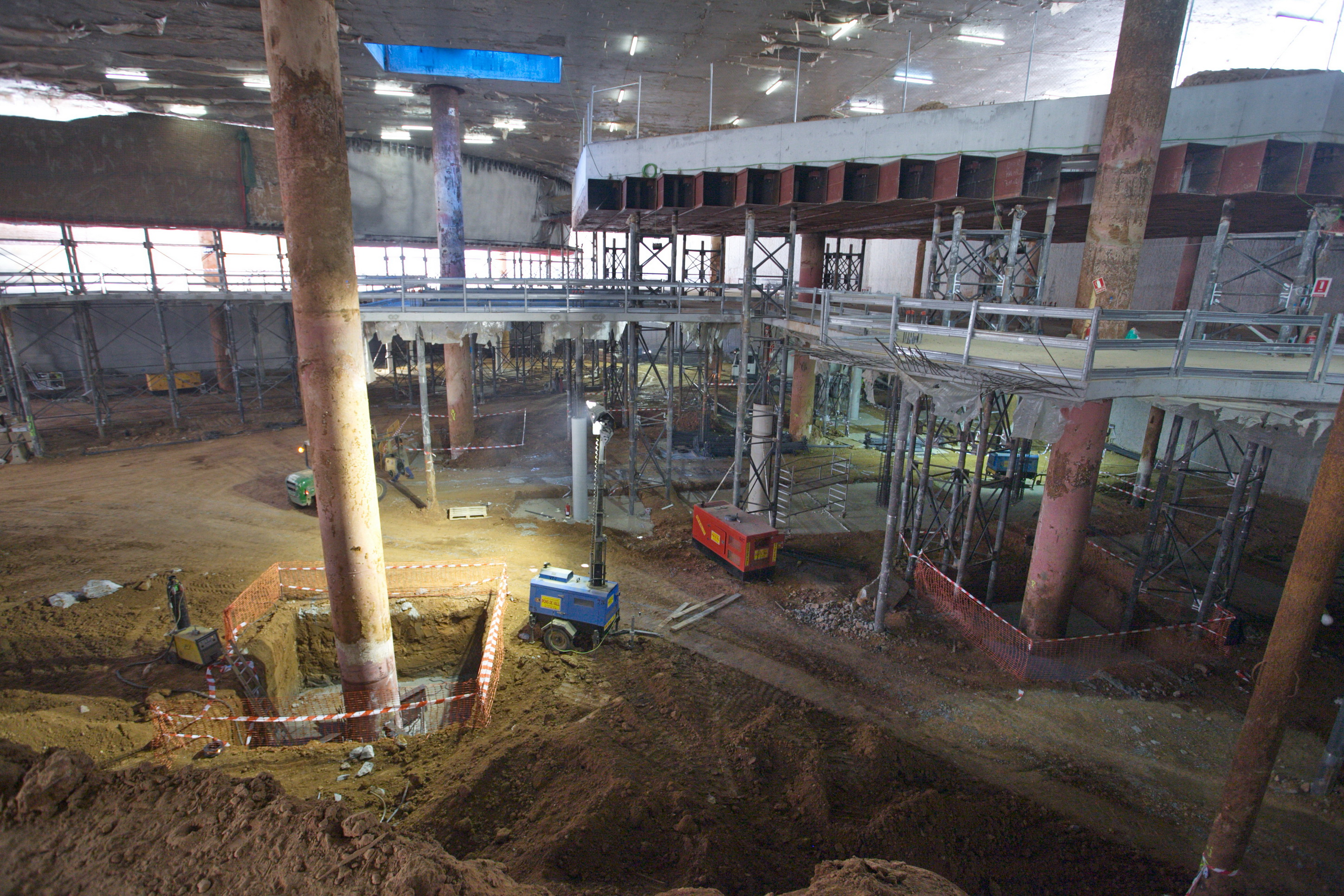 Mercat de Sant Antoni (Barcelona, 1879). Vista de la construcció del soterrani durant les obres de remodelació. A dalt a la dreta s'observa l'estructura tubular que sosté en voladís el tram de Via Romana trobat durant les obres.